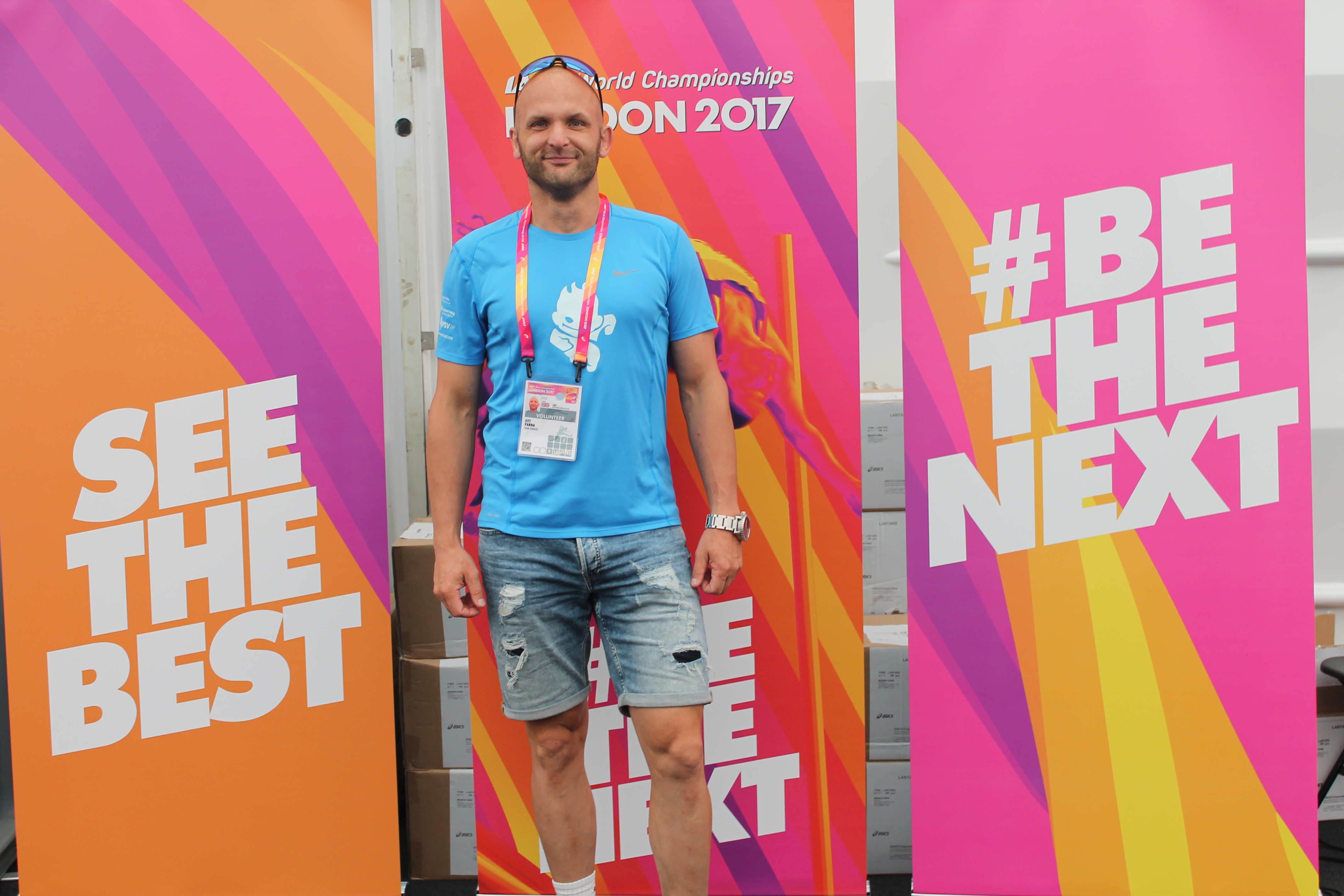 Ott Pärna IAAF London 2017 Kergejõustiku Maailmameistrivõistlustel.